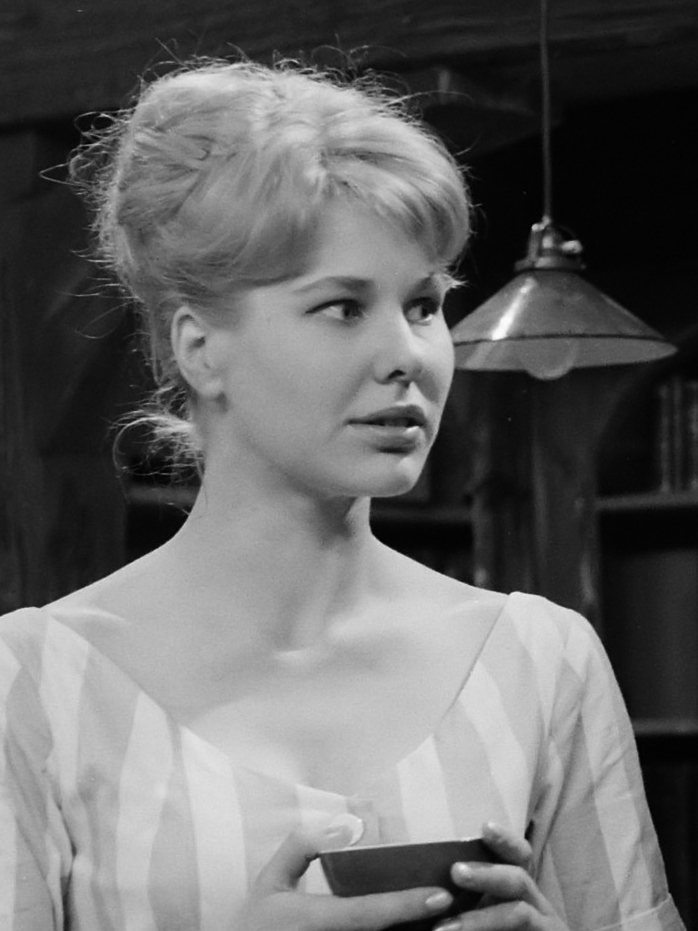 Televisiespel "Vuile handen", Femke Boersma (Jessica) Kees Brusse (Hoederer) 14 april 1960